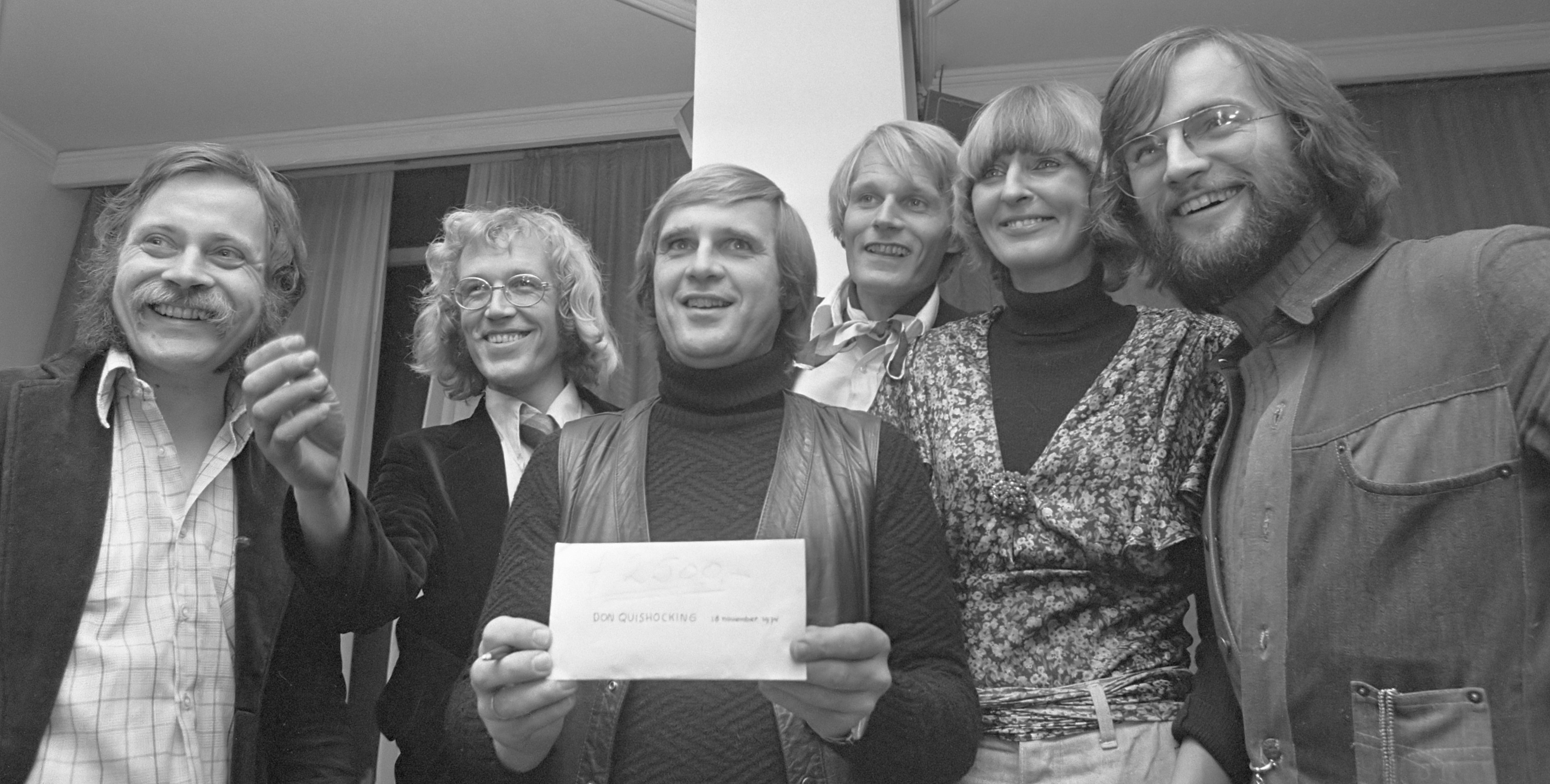 Louis Davidsprijs uitgereikt aan Don Quishocking in het Carltonhotel in Amsterdam; Don Quishocking met de prijs, en Willem Willmink: v.l.n.r. Willem Wilmink, Pieter van Empelen, Fred Florusse (met prijs), George Groot, Anke Groot, Jacques Klöters (met baard). Op de enveloppe staat met de hand geschreven dat het om 2500 gulden gaat.